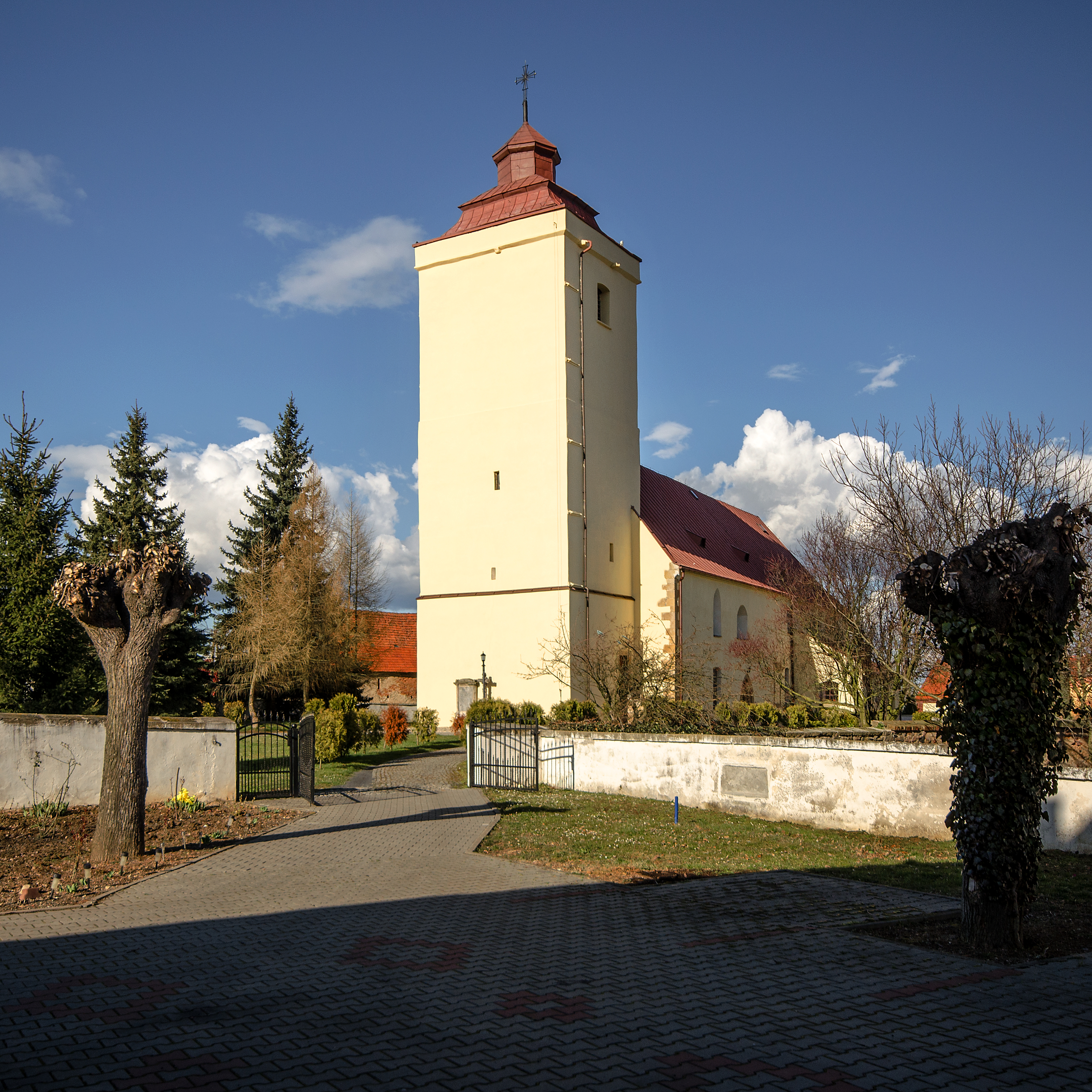 Krotoszyce, kościół fil. p.w. Wniebowzięcia NMP, XIV, 1626, 1777, 1874